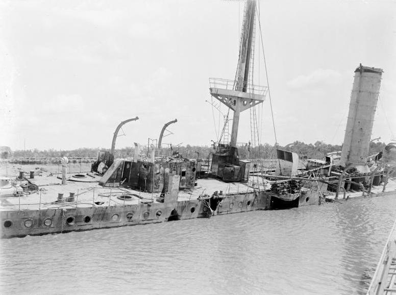 Kreuzer Königsberg zerschossen Information added by Wikimedia users.